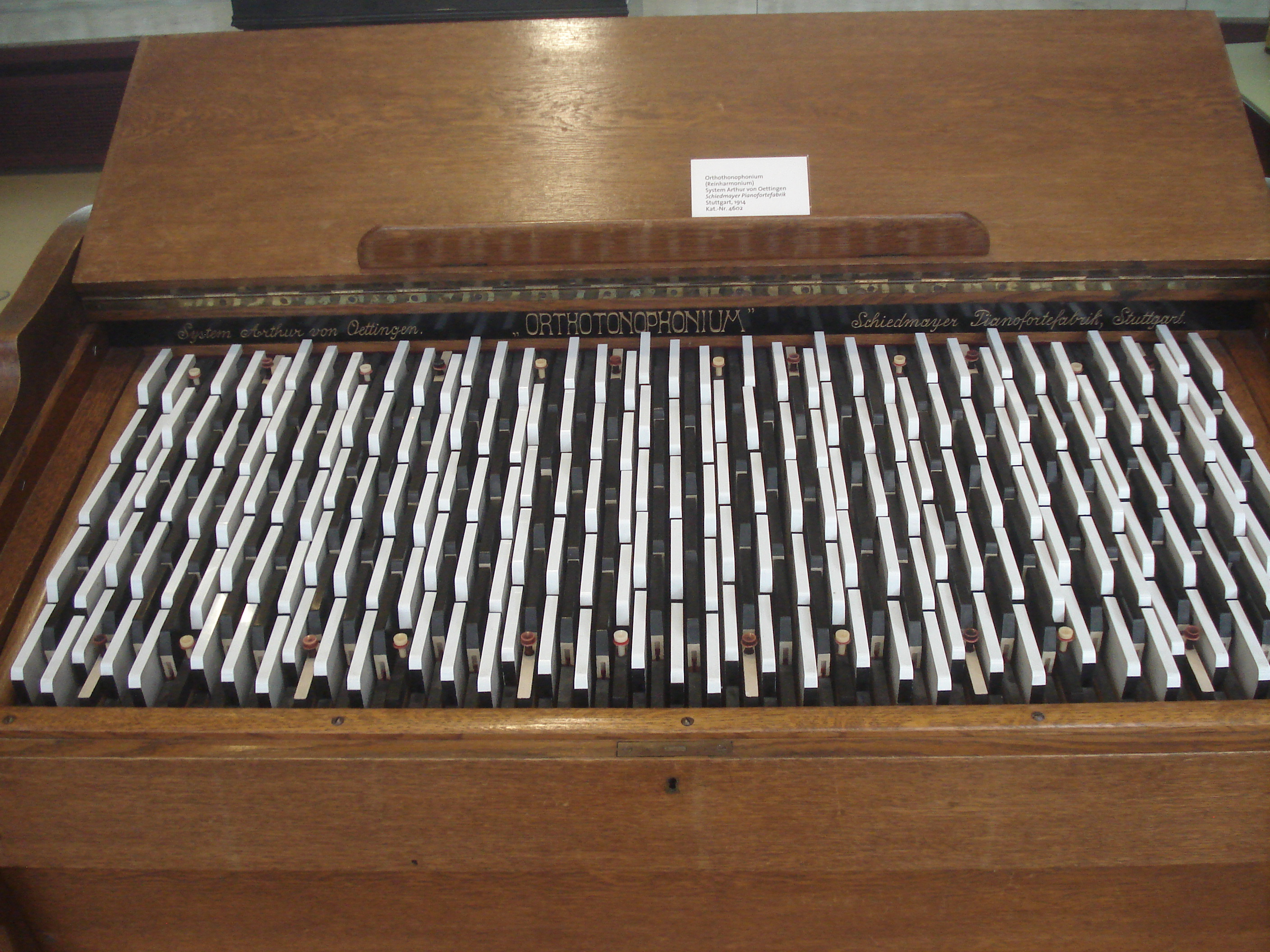 Orthotonophonium (Reinharmonium) System Arthur von Oettingen Schiedmayer Pianofortefabrik, Stuttgart, 1914 Kat.-Nr.4602, Berlin Music Instrument Museum